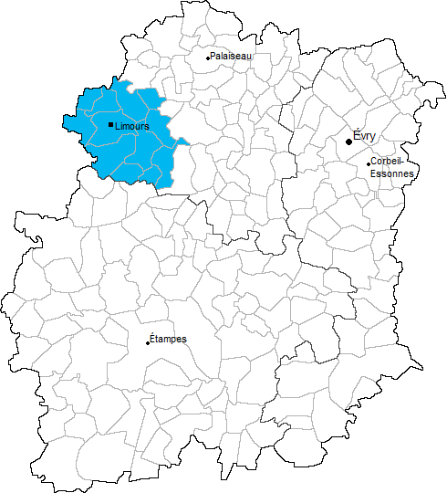 Carte de localisation du canton de Limours en Essonne (91)